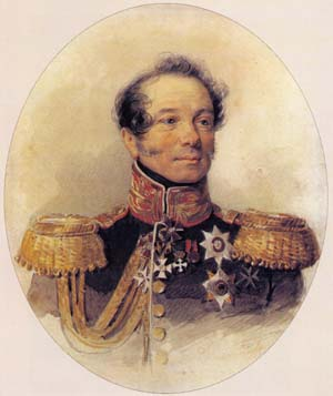 Граф Комаровский Евграф Федотович (1769-1843)